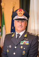 Foto del Comandante Generale della Guardia di Finanza